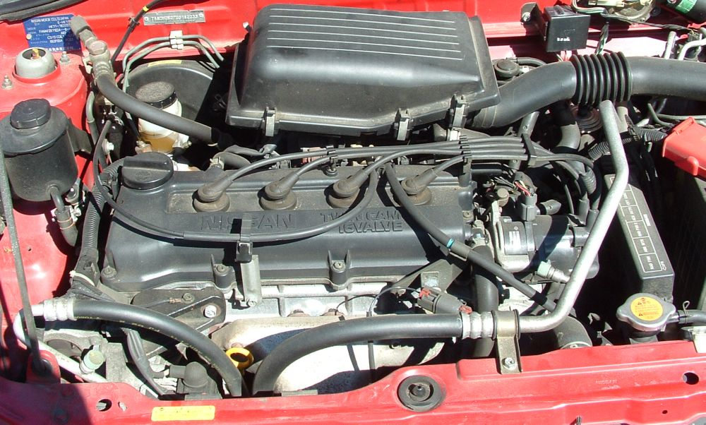 Nissan CG13DE Engine 1.3l DOHC EFI